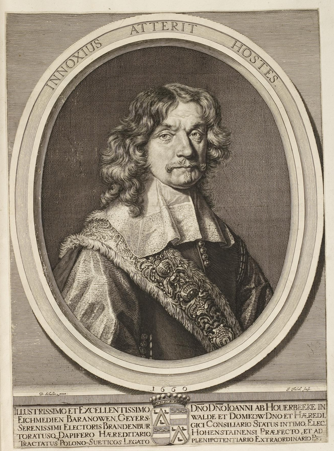 Grafik aus dem Klebeband Nr. 1 der Fürstlich Waldeckschen Hofbibliothek Arolsen Motiv: Johann von Hoverbeck